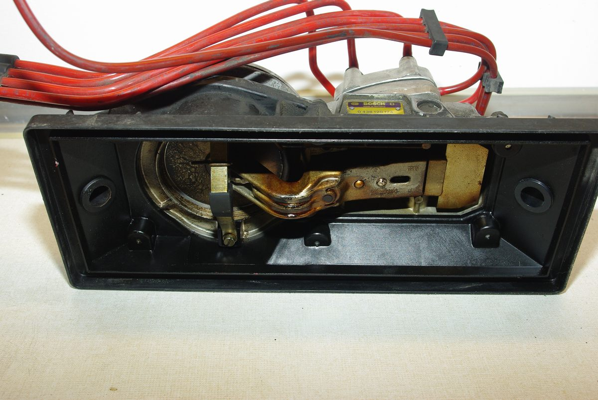 Unterteil Stauscheiben-Luftmengenmesser und Kraftstoffmengenteiler aus Escort XR3i